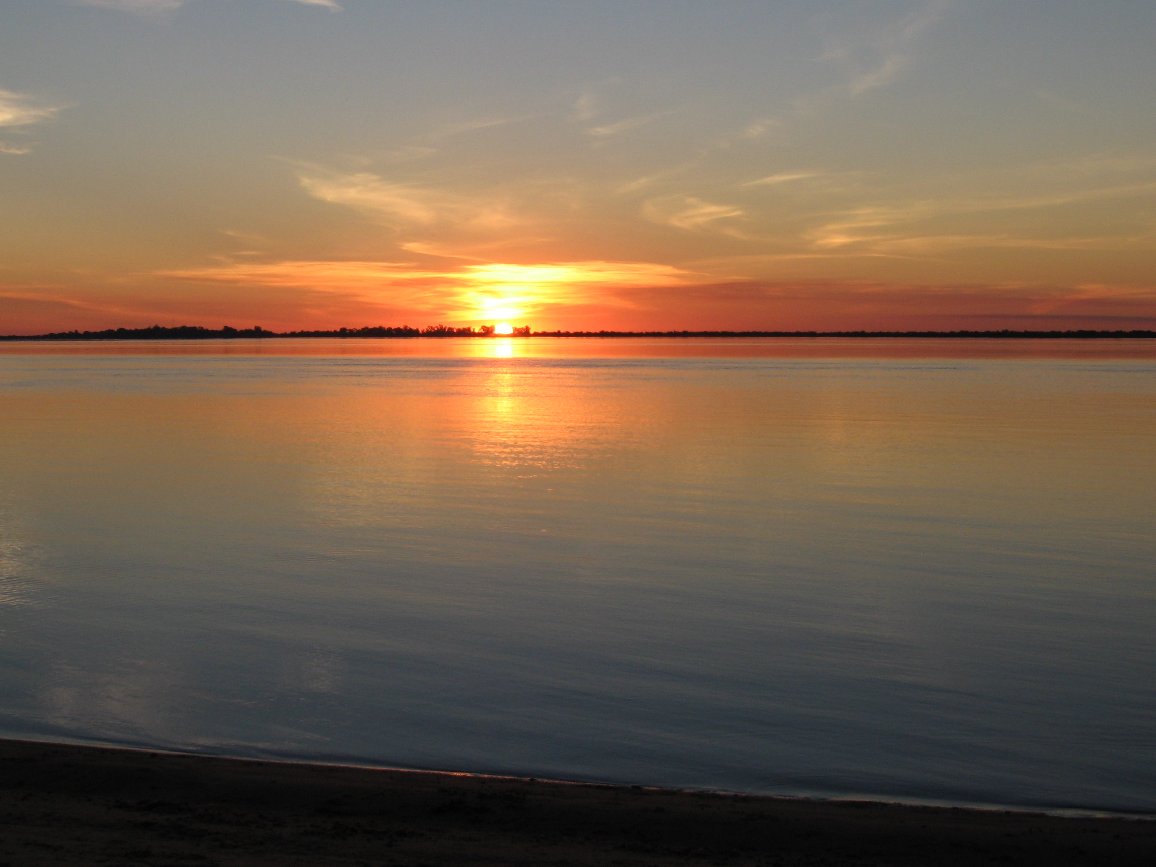 Río Paraná frente a la costa de Paso de la Patria